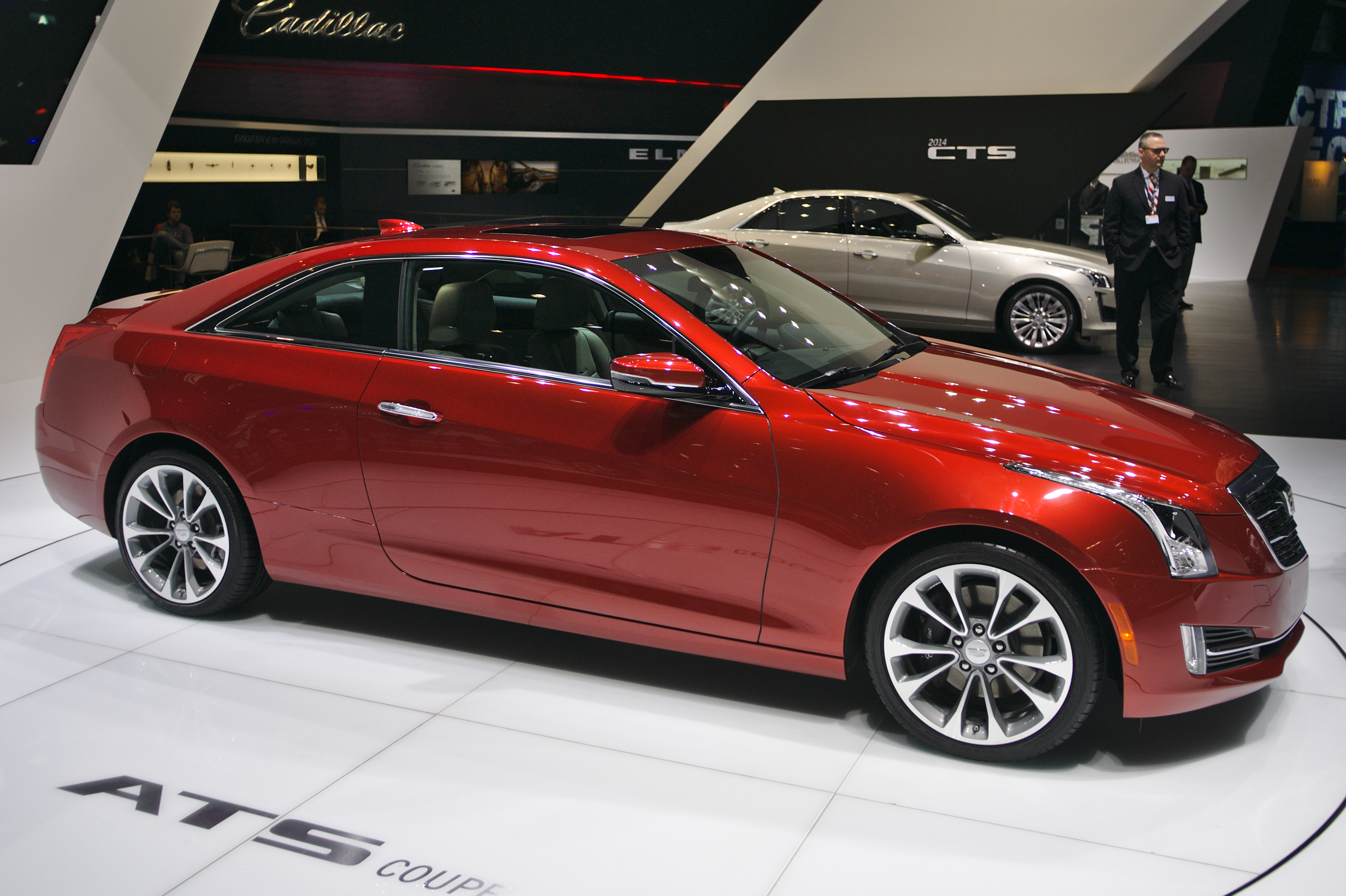 Salon de l'auto de Genève 2014 - 20140305 - Cadillac ATS Coupé